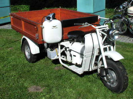 Moto-Guzzi Mototriciclo